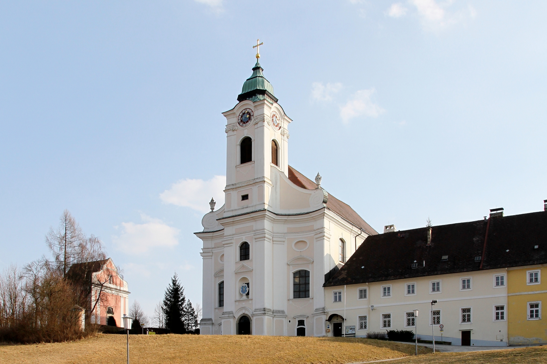 Bildmitte die katholische Pfarr- und Wallfahrtskirche Mariae Geburt in der niederösterreichischen Ortschaft Maria Langegg. Links die sogenannte Ursprungskapelle und rechts ein Teil des Nordtraktes des ehemaligen Klosters.